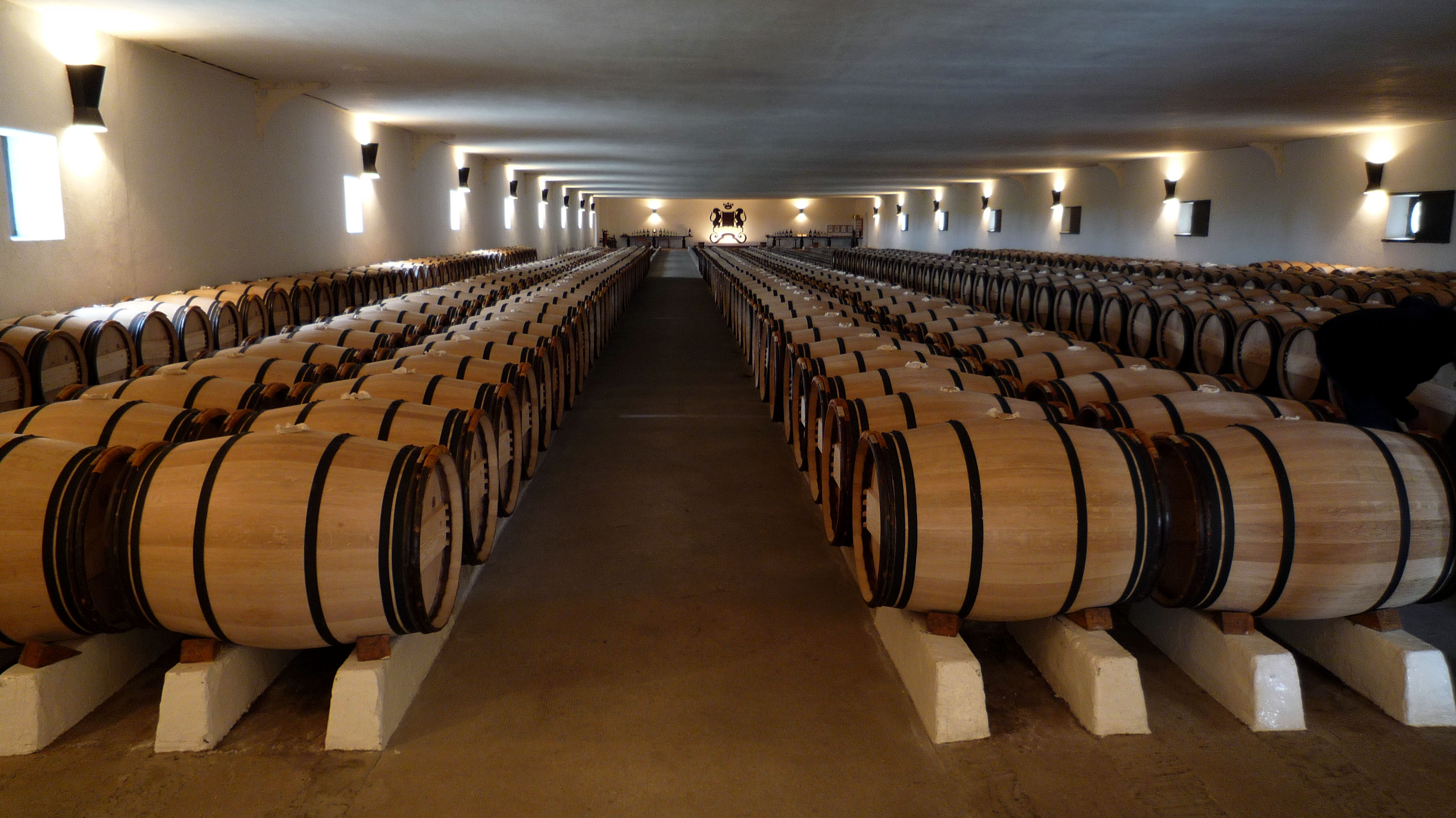 Château Mouton Rothschild - neue Barriques für den Jahrgang 2008